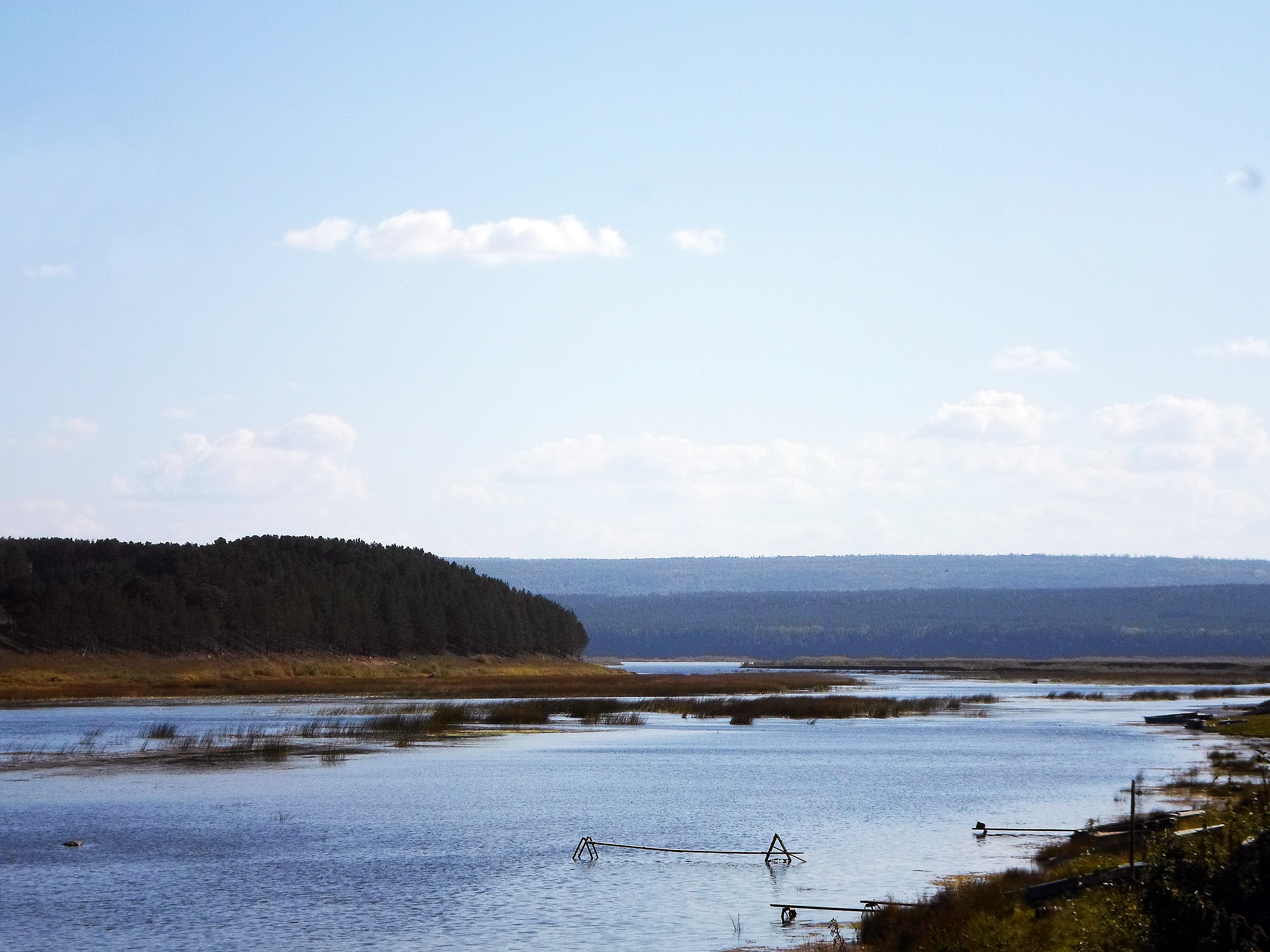 Вид на устье реки Чадобец от села Заледеево. Кежемский район Красноярского края.